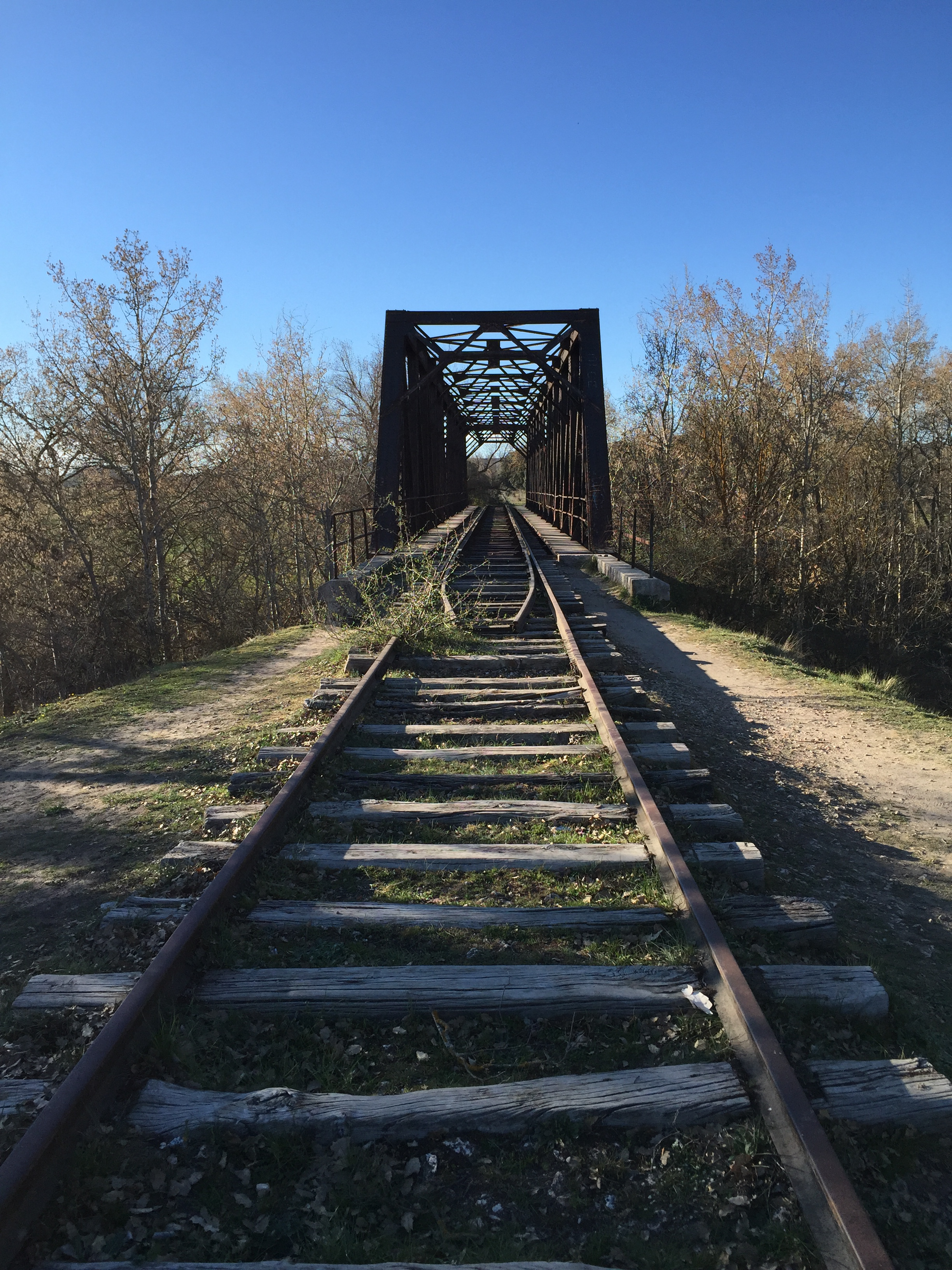 Riberas del río Duero y afluentes This is a photography of a Special Area of Conservation in Spain with the ID: ES4170083. Natura2000 entry, EEA entry